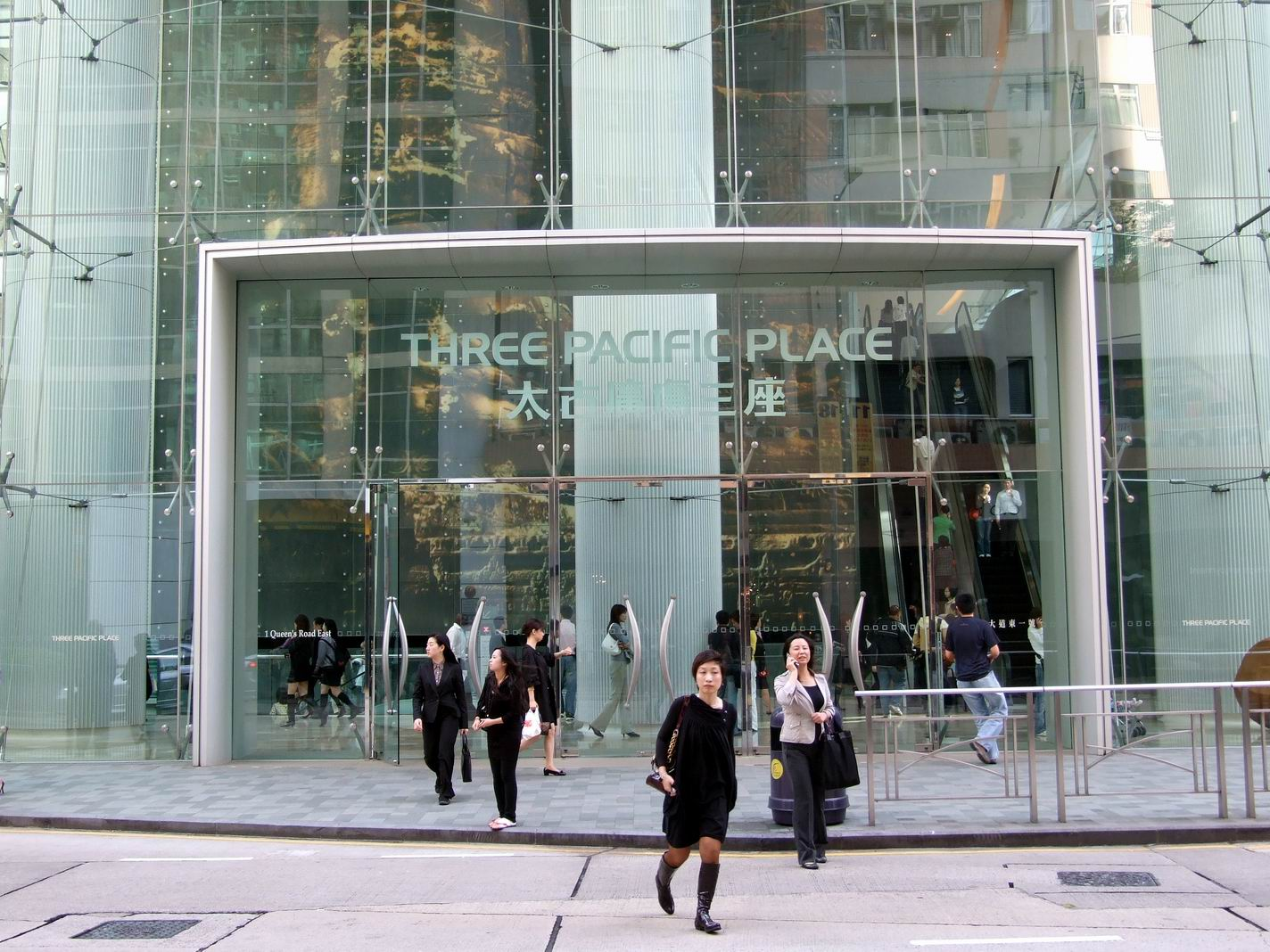 太古廣場3期